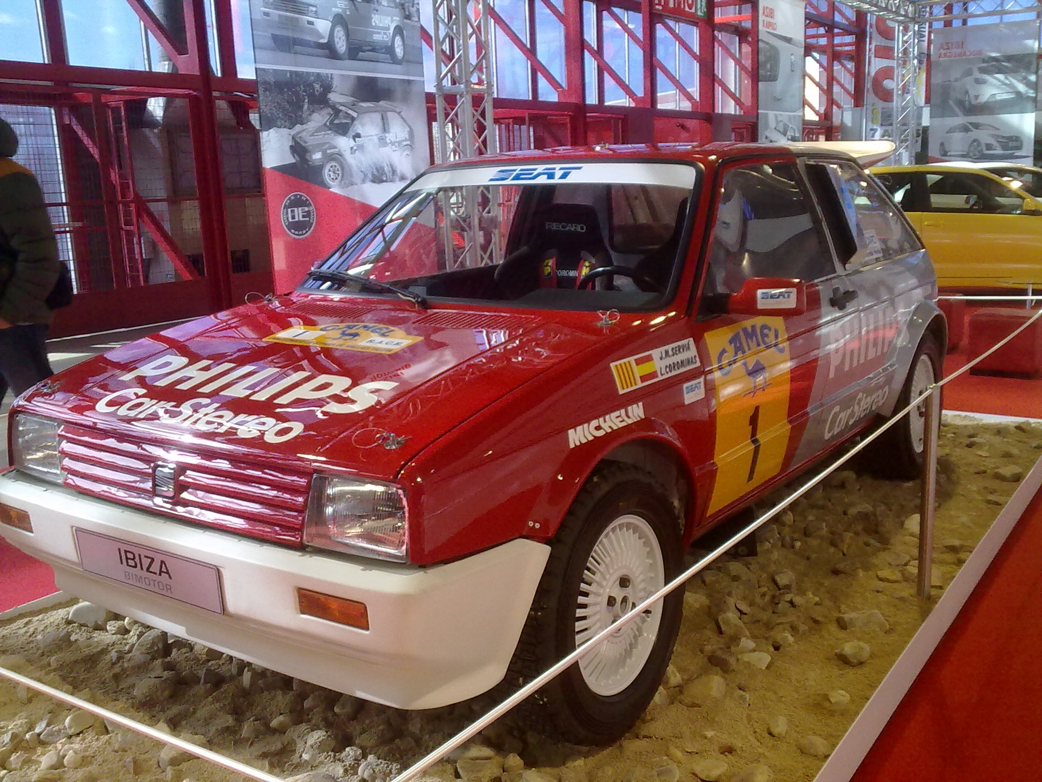 Retro clásica Madrid 2014 , 30 aniversario del SEAT